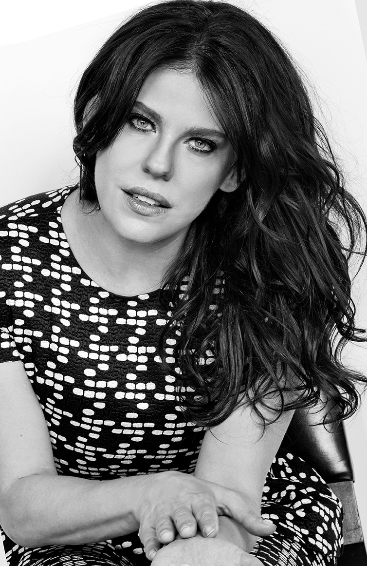 Retrato Bárbara Paz